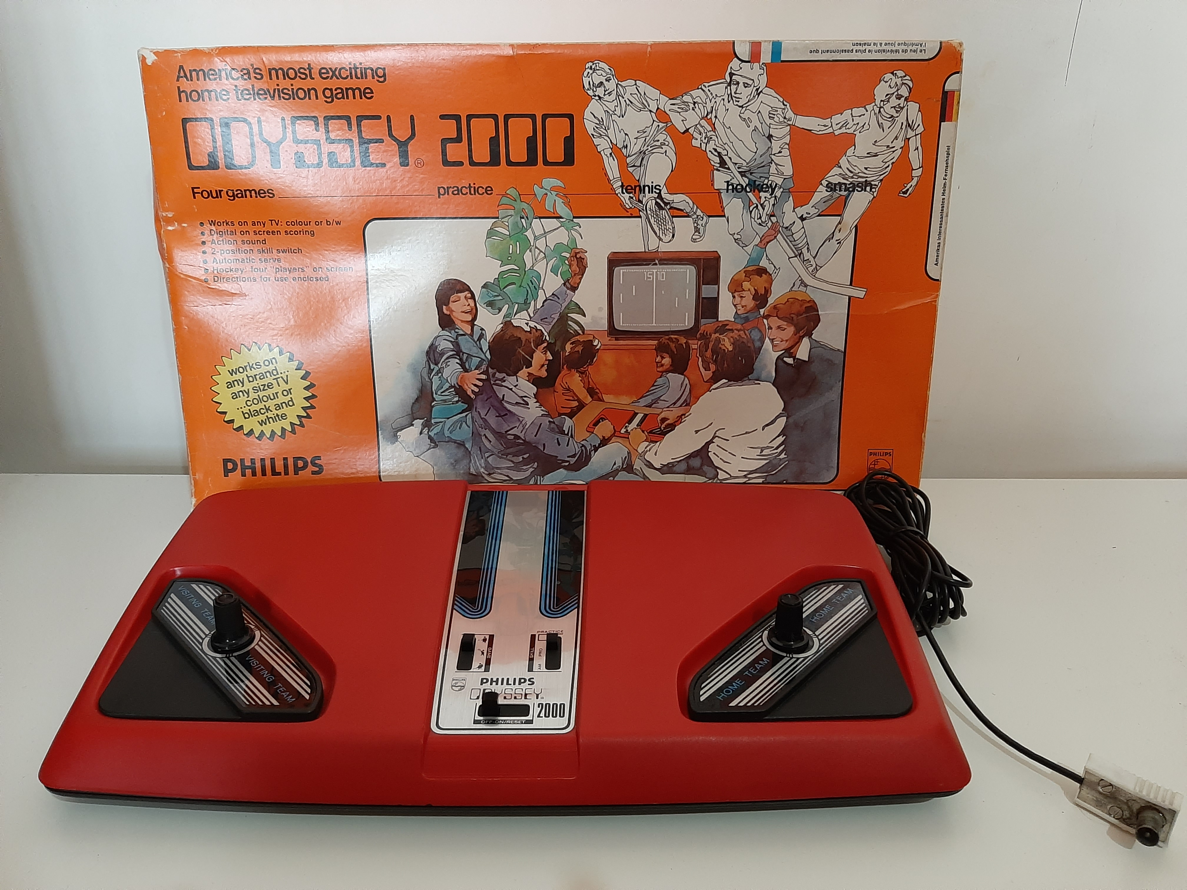 Console Philips odyssey 2000 - Collezione Gioia